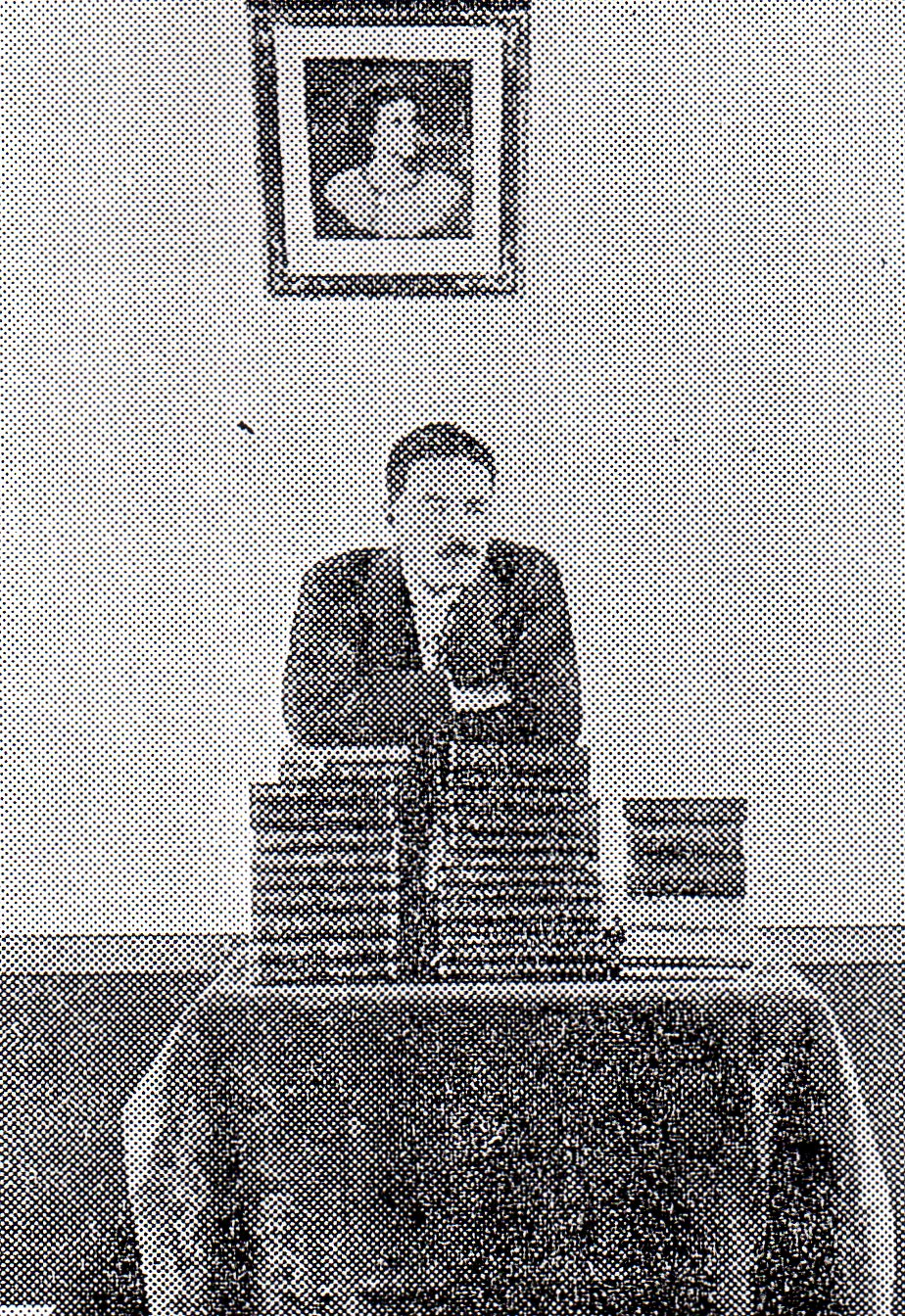 柏木講談での内村鑑三と彼の著作